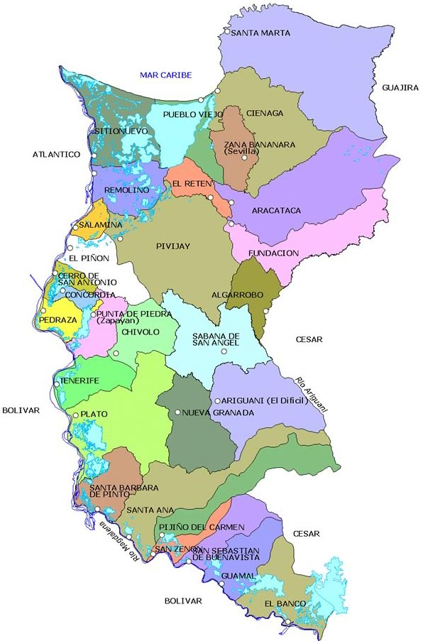 Mapa politico Magdalena